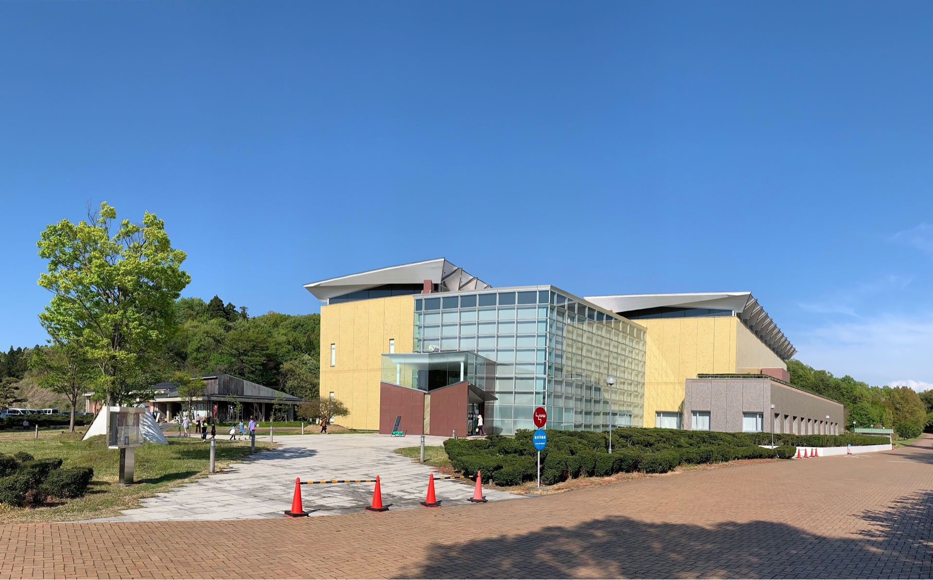 新津美術館（2019年5月、新潟市秋葉区）。左奥の建物は古津八幡山遺跡 弥生の丘展示館。